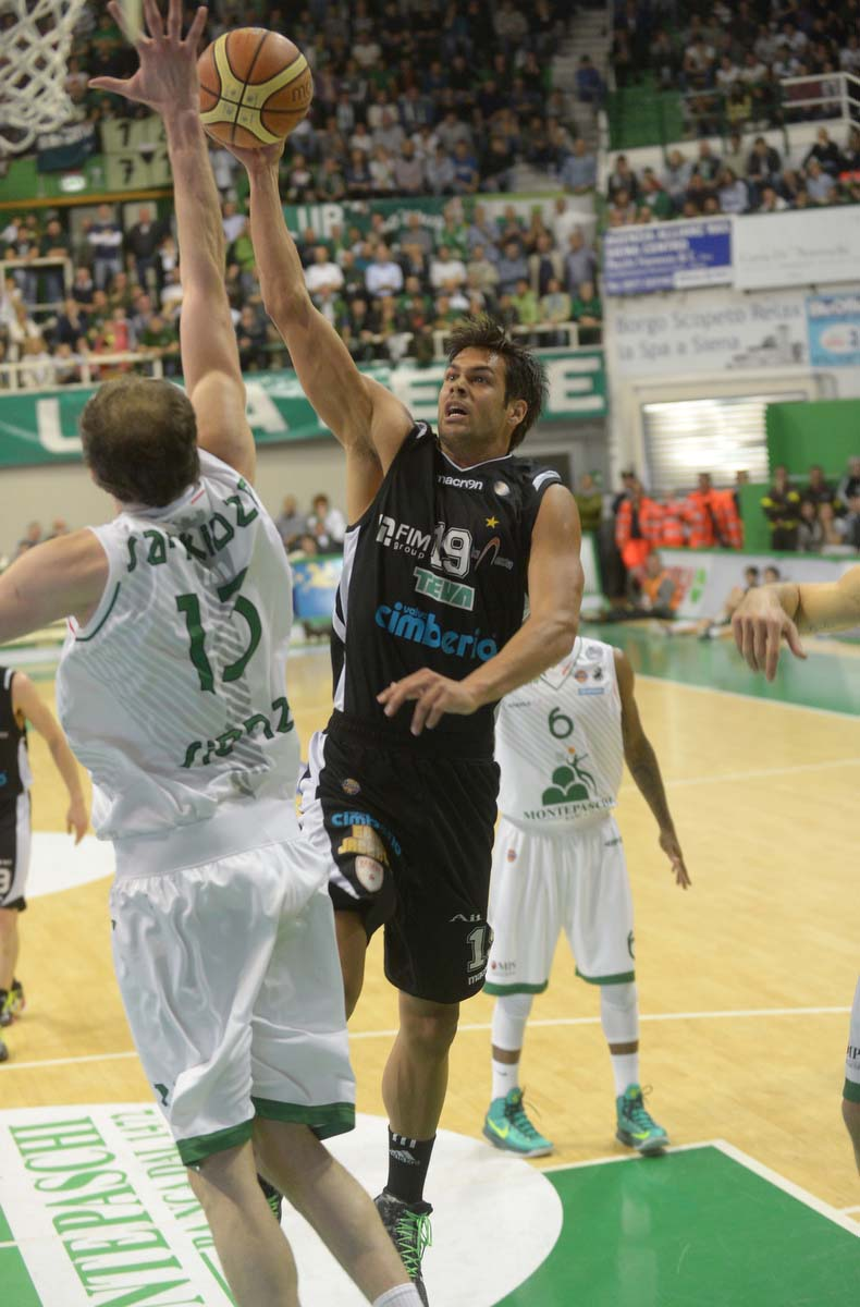 Bruno Cerella